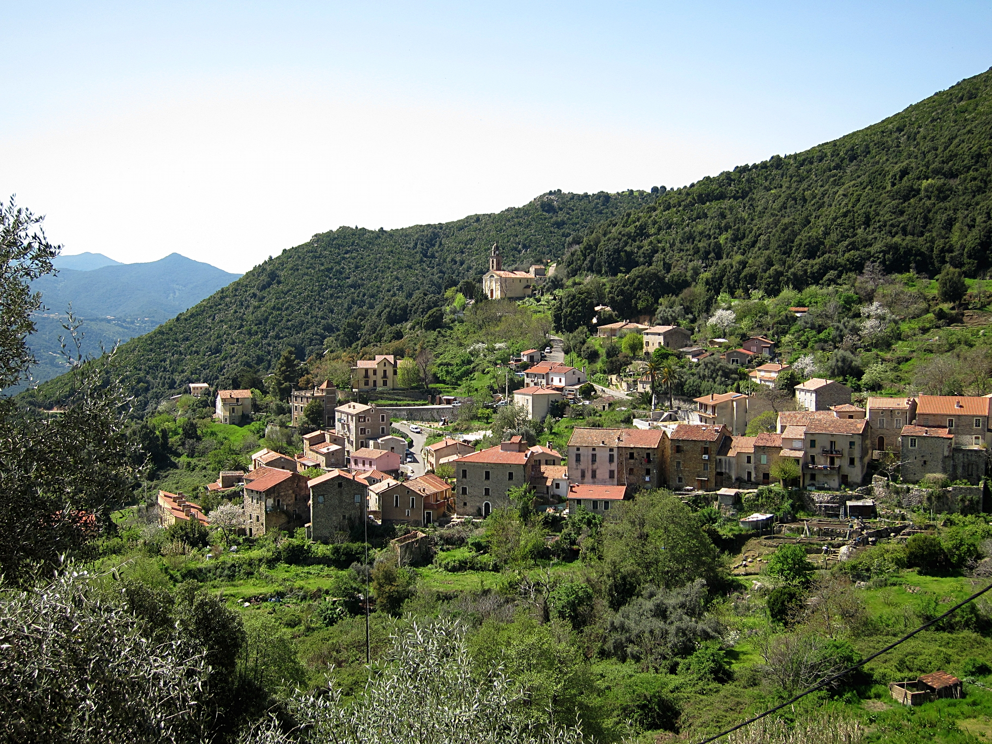 Vue du village d'Ocana (Corse).